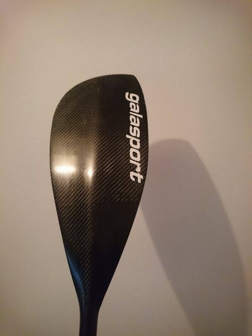 kajak-veslo-karbonsko-slika-53112556